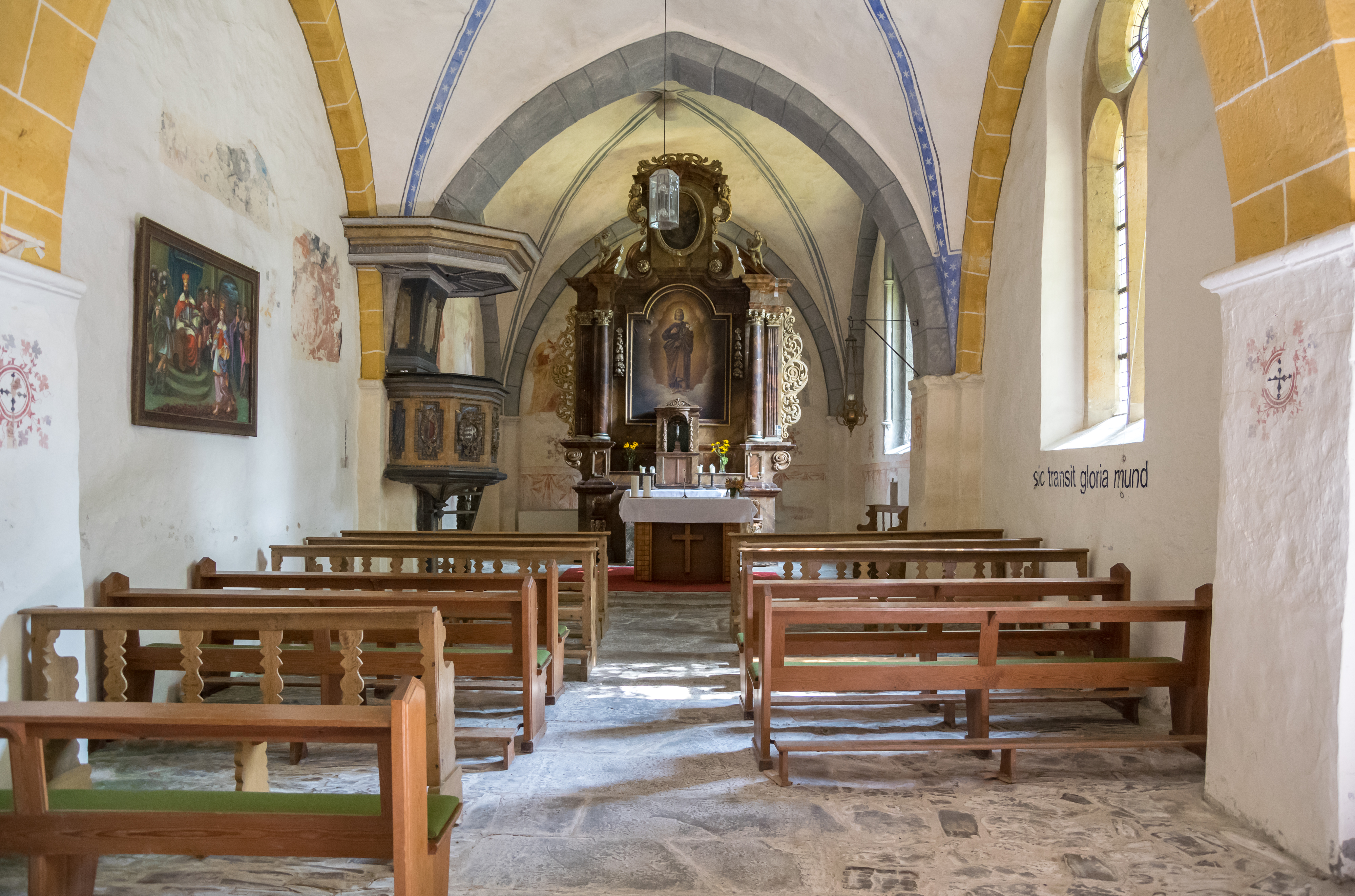 Alte Pfarrkirche St. Meinolfus in Borchen-Dörenhagen, Kreis Paderborn